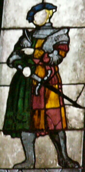 Ausschnitt aus dem Markgrafenfenster von St. Sebald in Nürnberg: Markgraf Gumbert